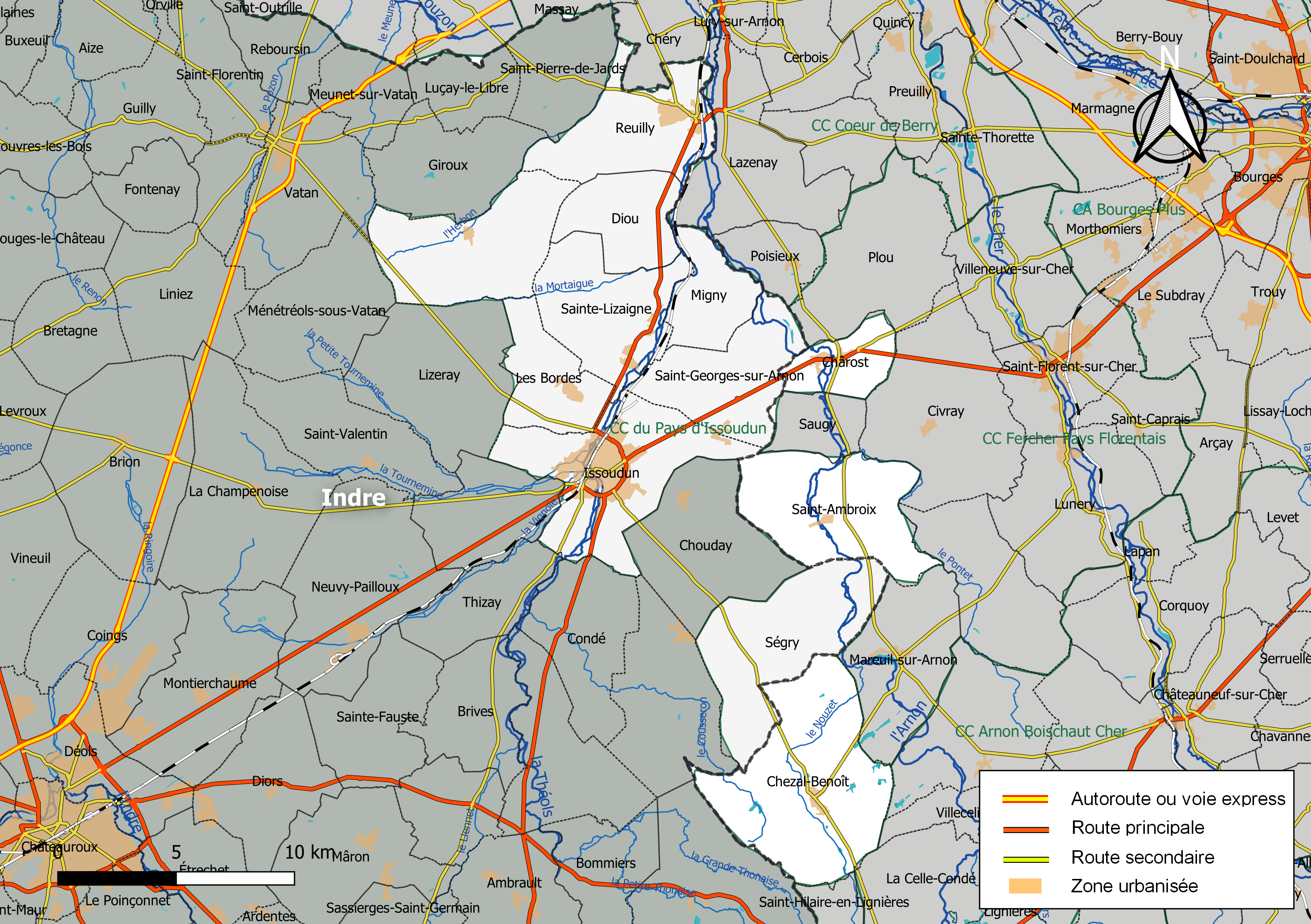 Carte géographique de la communauté de communes du Pays d’Issoudun, département du Cher et de l'Indre, France. Composition au 1er janvier 2019.